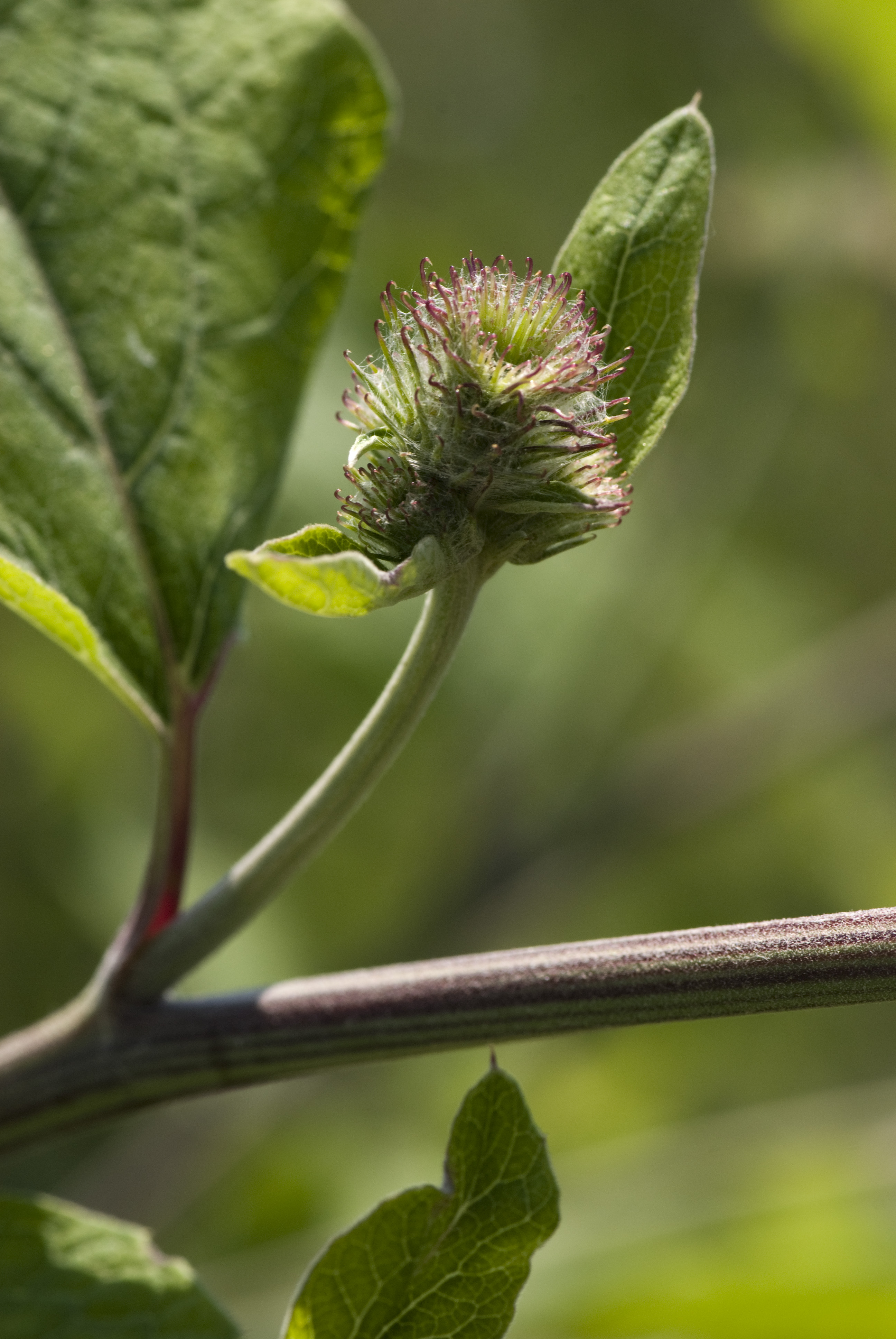 Arctium nemorosum Velennes (Somme), France